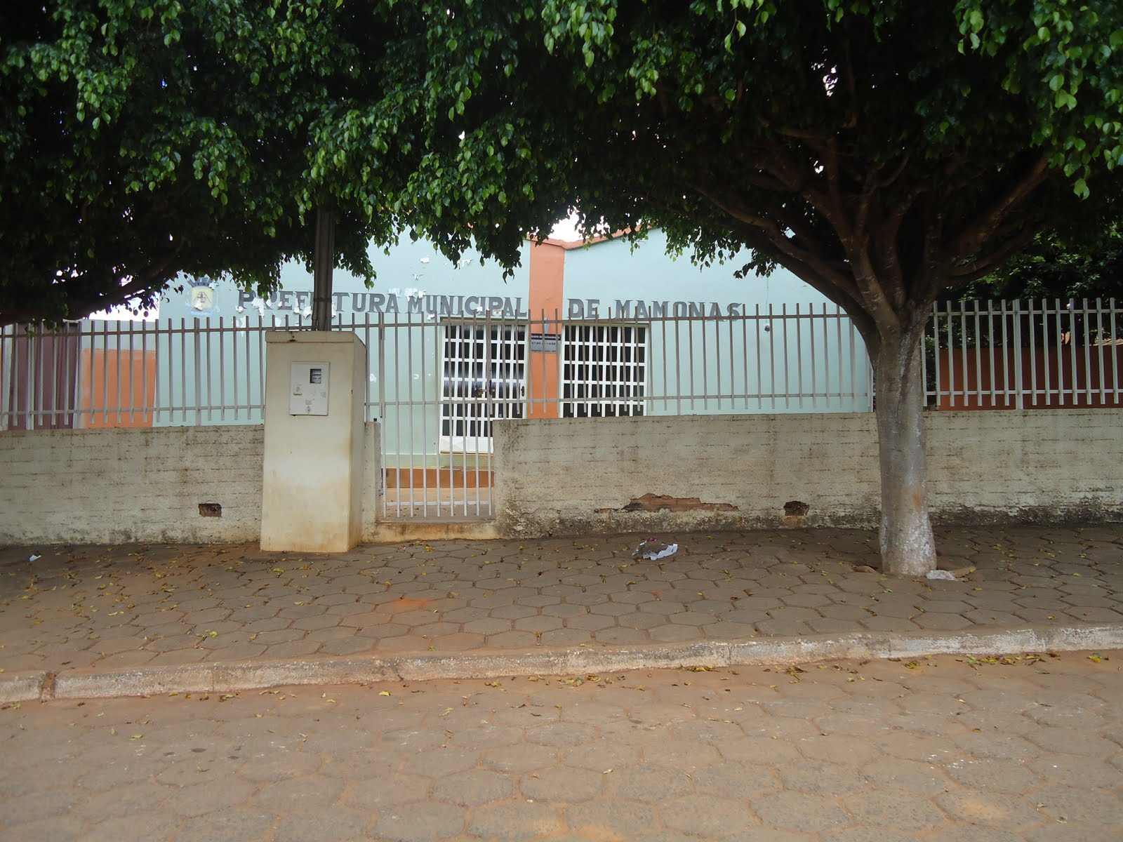 lo